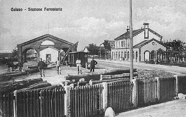 Intérieur de la gare vers 1900, avec le bâtiment voyageurs et une halle à marchandises.